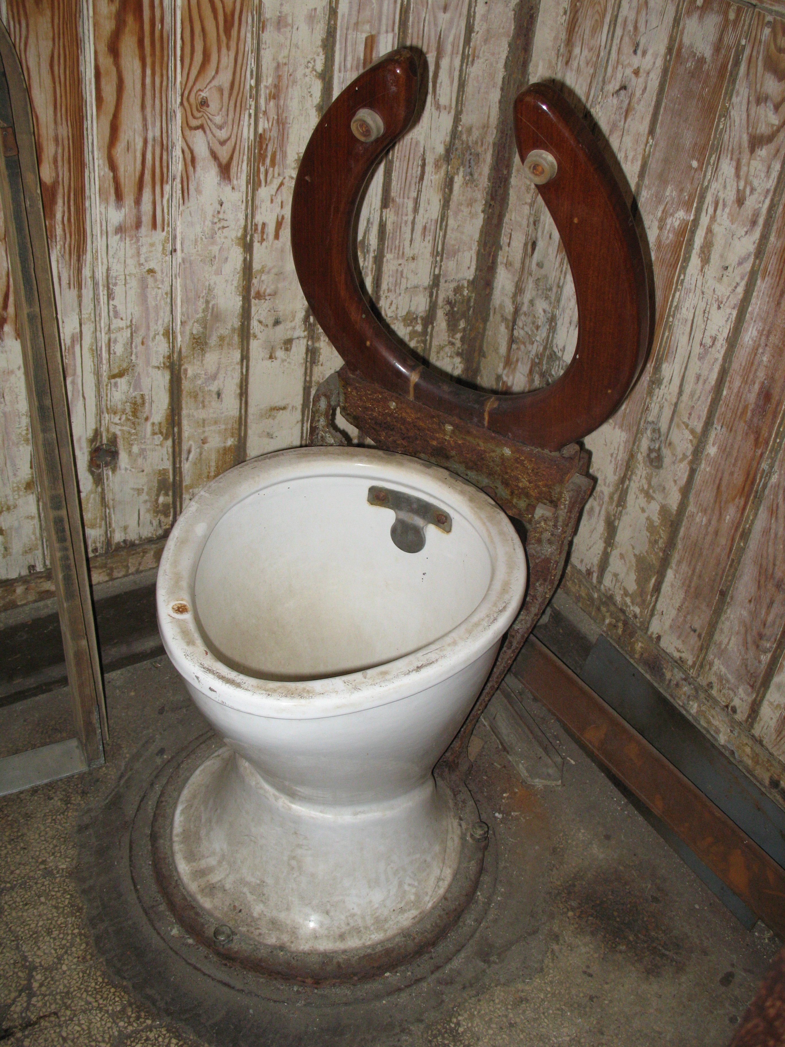 Toilette im Preußischen Personenwagen Essen 2317, Baujahr 1913; Eisenbahnmuseum Bochum - Dahlhausen